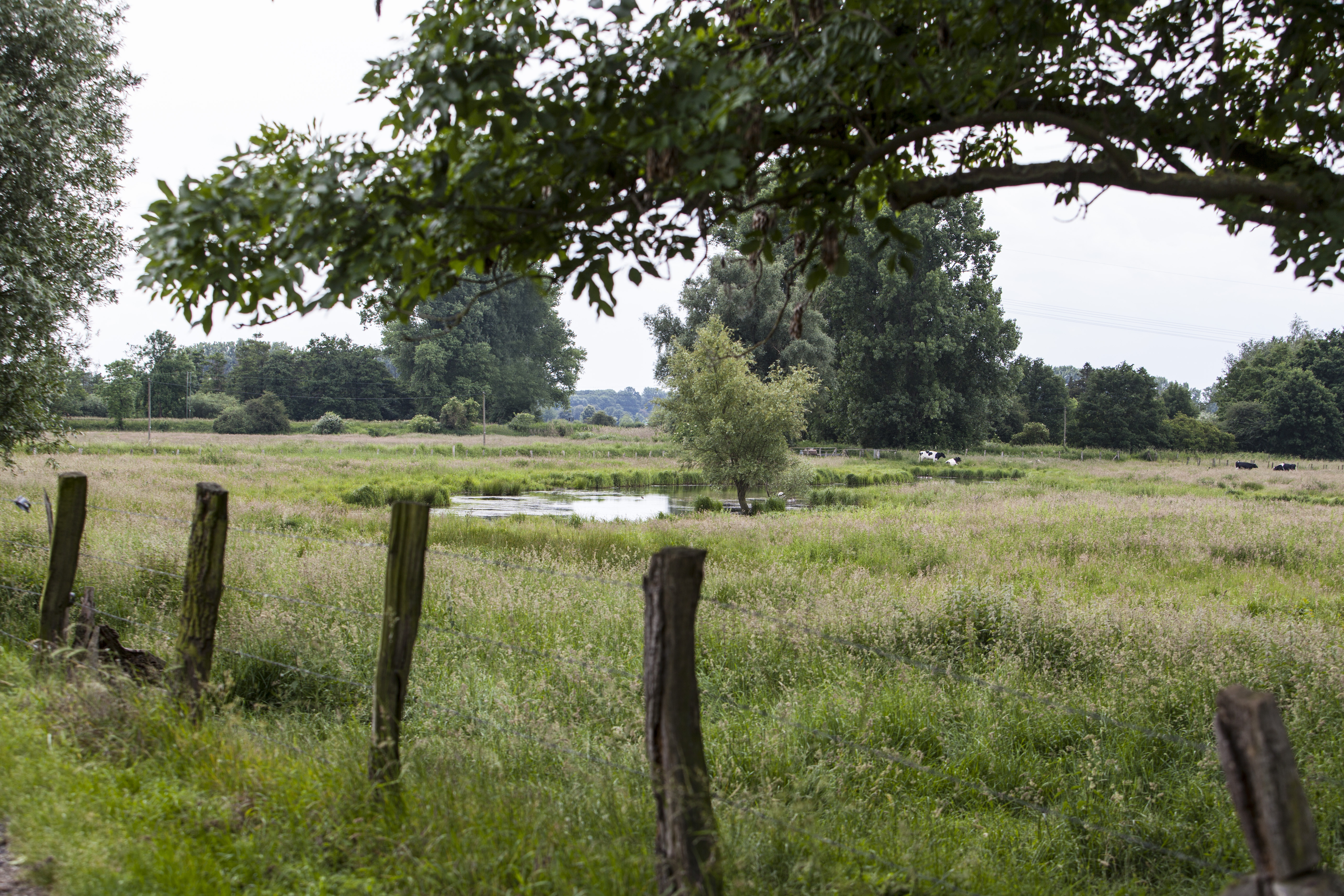 NSG VIE-030 Salbruch